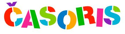 Logotip